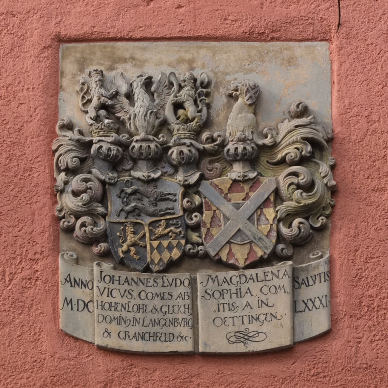 Inschrift und Wappen über dem Eingang zum Schlosshof des Schlosses Bartenau in Künzelsau.